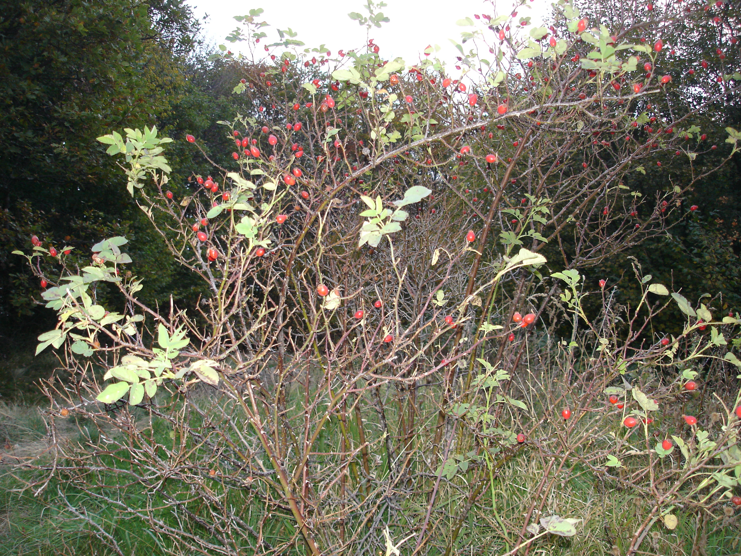 Rosa canina in Vitosha, Bulgaria